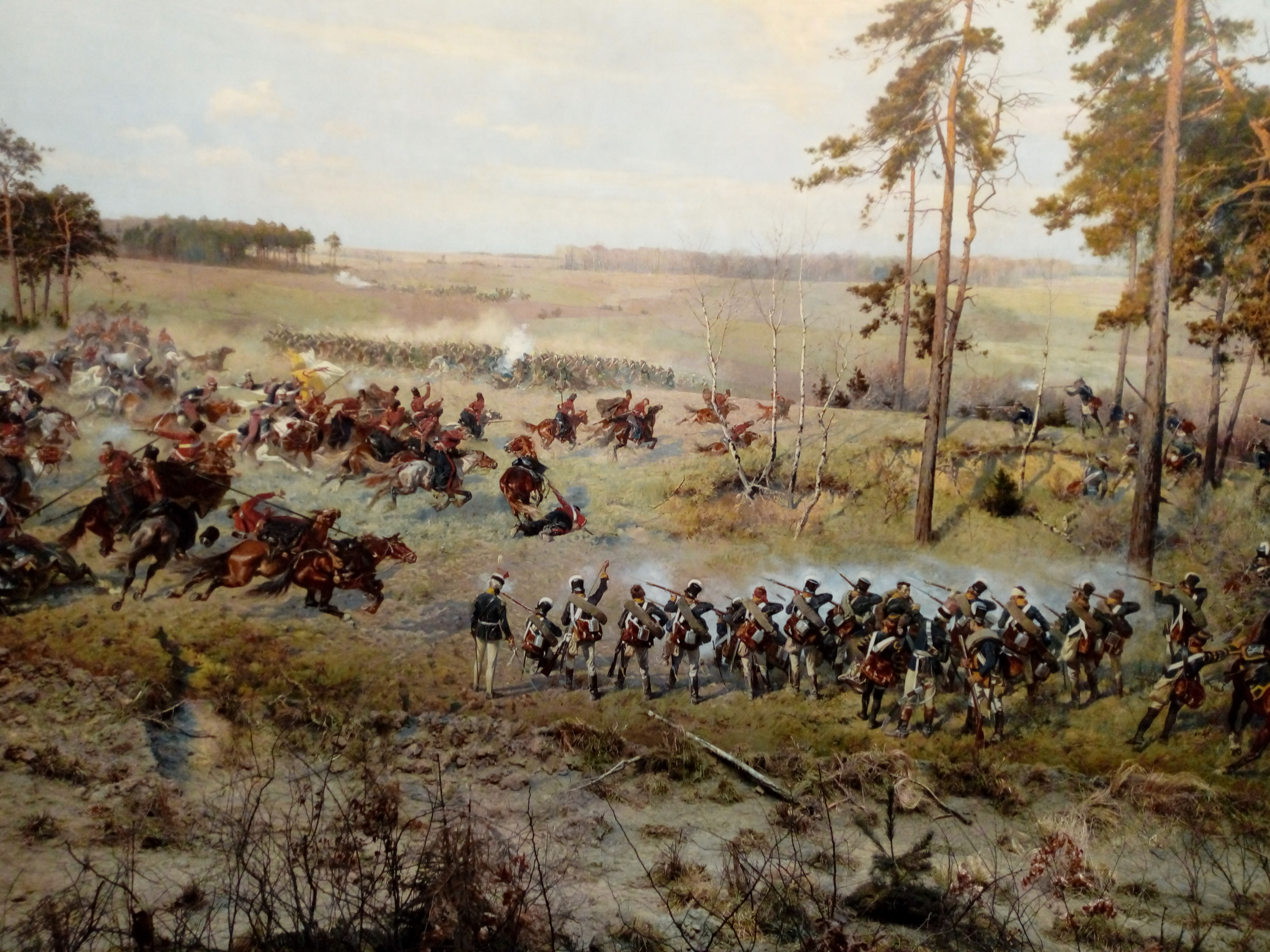 Wojciech Kossak (1856–1942) Alternative names Adalbert KossakDescriptionPolish painterDate of birth/death 31 December 1857 29 July 1942Location of birth/death Paris KrakówWork location Paris (1877); Russia; Vienna; Munich (1873–1876); Berlin (1895–1902); Warsaw (1913–1921); United States of America (1923–1924); United States of America (1928–1932)Authority control : Q727637 VIAF: 47561842 ISNI: 0000 0001 1026 2854 ULAN: 500022832 LCCN: n84020599 Open Library: OL1203578A WorldCat creator QS:P170,Q727637 , Jan Styka (1858–1925) Alternative names Jan Stuka; Jean styka; J. StykaDescriptionPolish painterDate of birth/death 8 April 1858 11 April 1925Location of birth/death Lviv RomeWork location ParisAuthority control : Q708238 VIAF: 47640606 ISNI: 0000 0000 7821 6566 ULAN: 500024831 LCCN: nr90011862 Open Library: OL1306606A WorldCat creator QS:P170,Q708238 Fragment Panoramy Racławickiej.